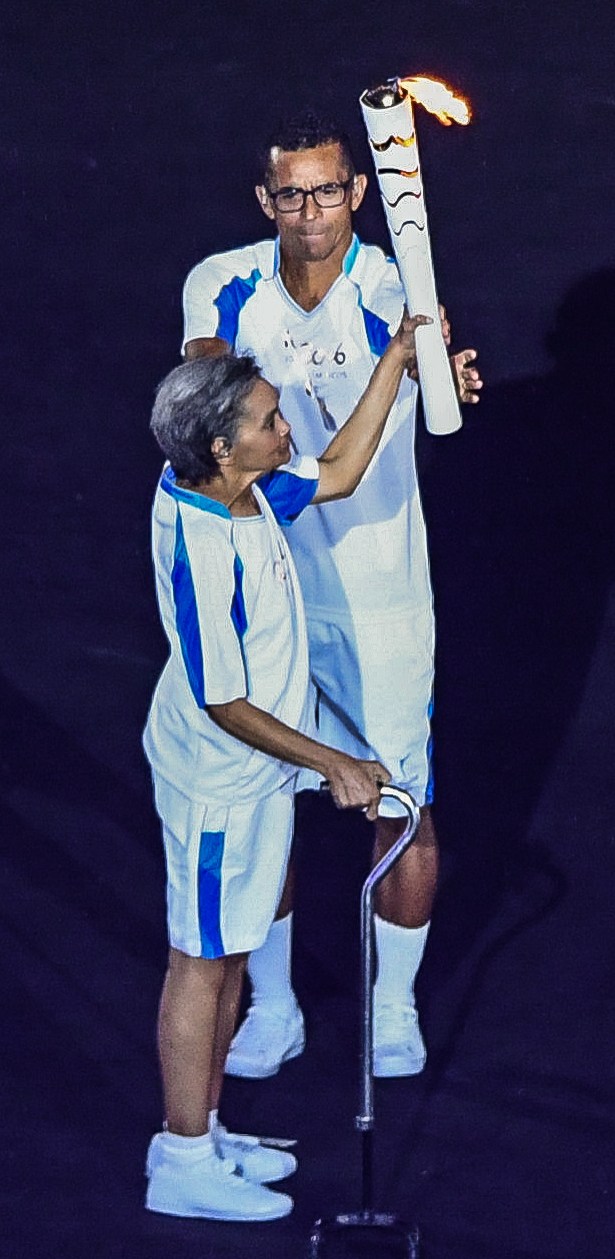 Rio de Janeiro - Cerimônia de abertura dos Jogos Paralmpicos Rio 2016 no Estdio do Maracanã (Tomaz Silva/Agência Brasil)